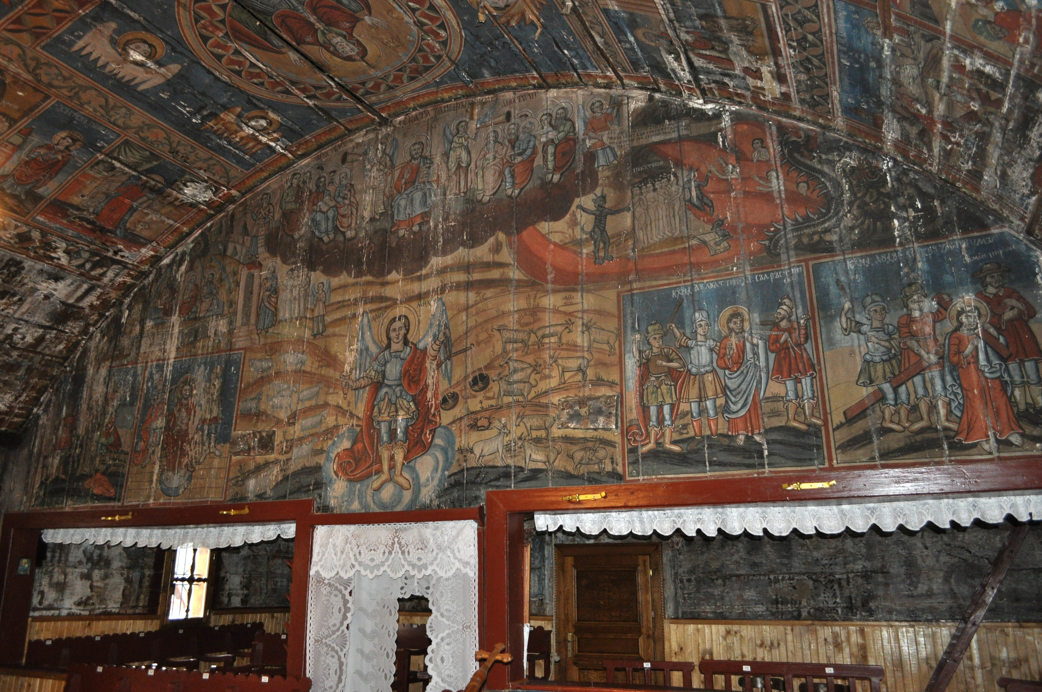 Biserica de lemn din Roșia Nouă, județul Arad